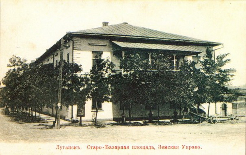 Старо-Базарная площадь в Луганске.